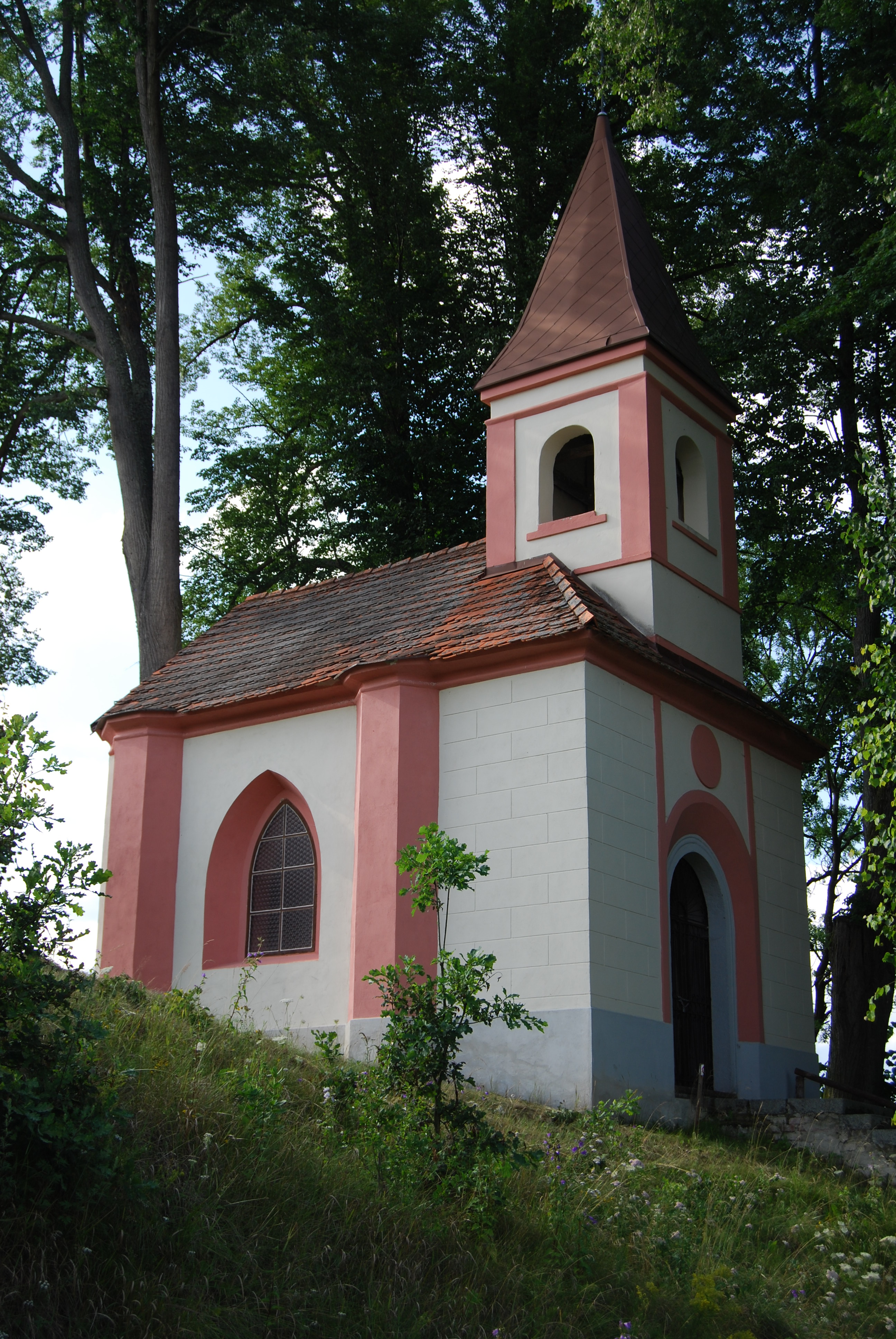 Kaple z roku 1863 se nachází u mlýna na říčce Smutná u veřejné cyklostezky. Je zasvěcená svatému Františku Serafinskému. Hanov je část obce Zběšičky v okrese Písek. Česká republika.